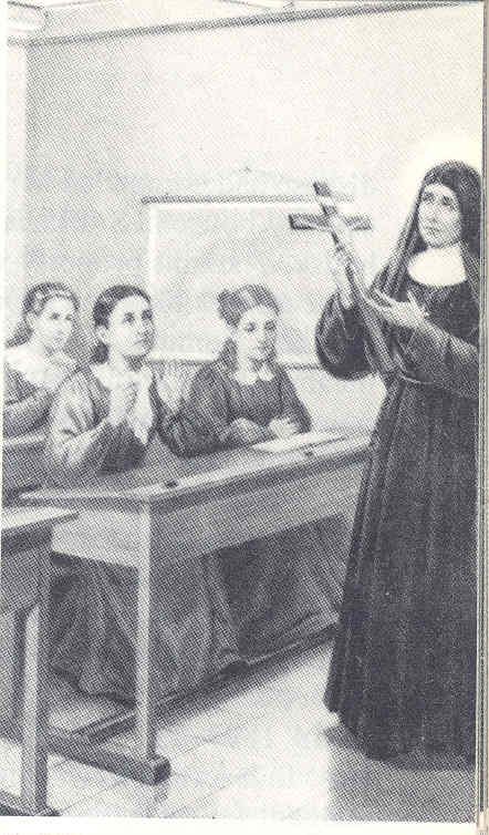 Immagine di Santa Gemma Galgani durante gli studi presso la Beata Elena Guerra